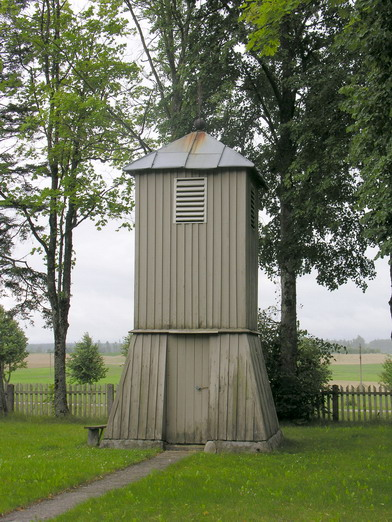 Renavo bažnyčios varpinė Foto: Algirdas, 2005 m. rugpjūčio 14 d.